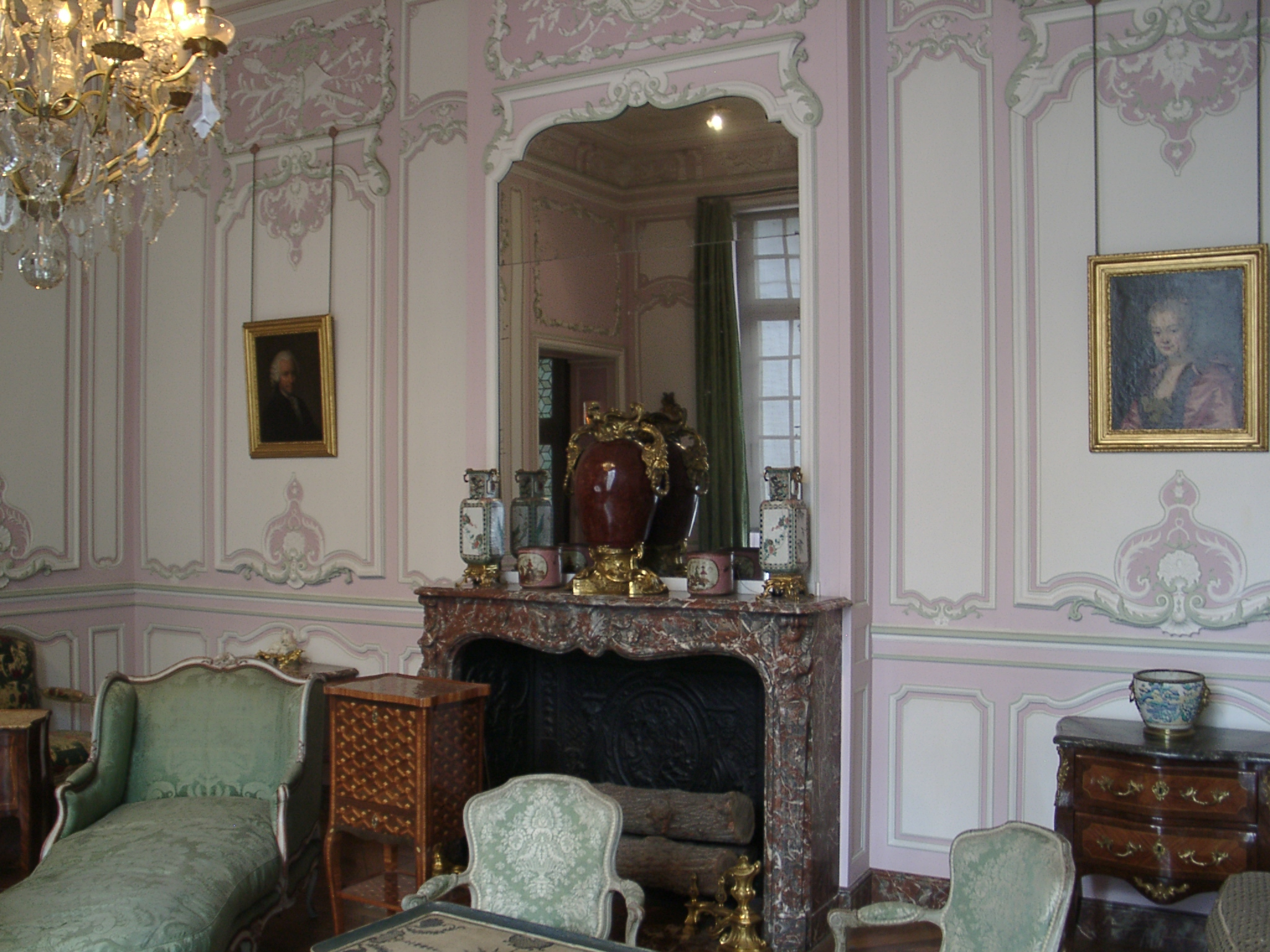 Musée Carnavalet